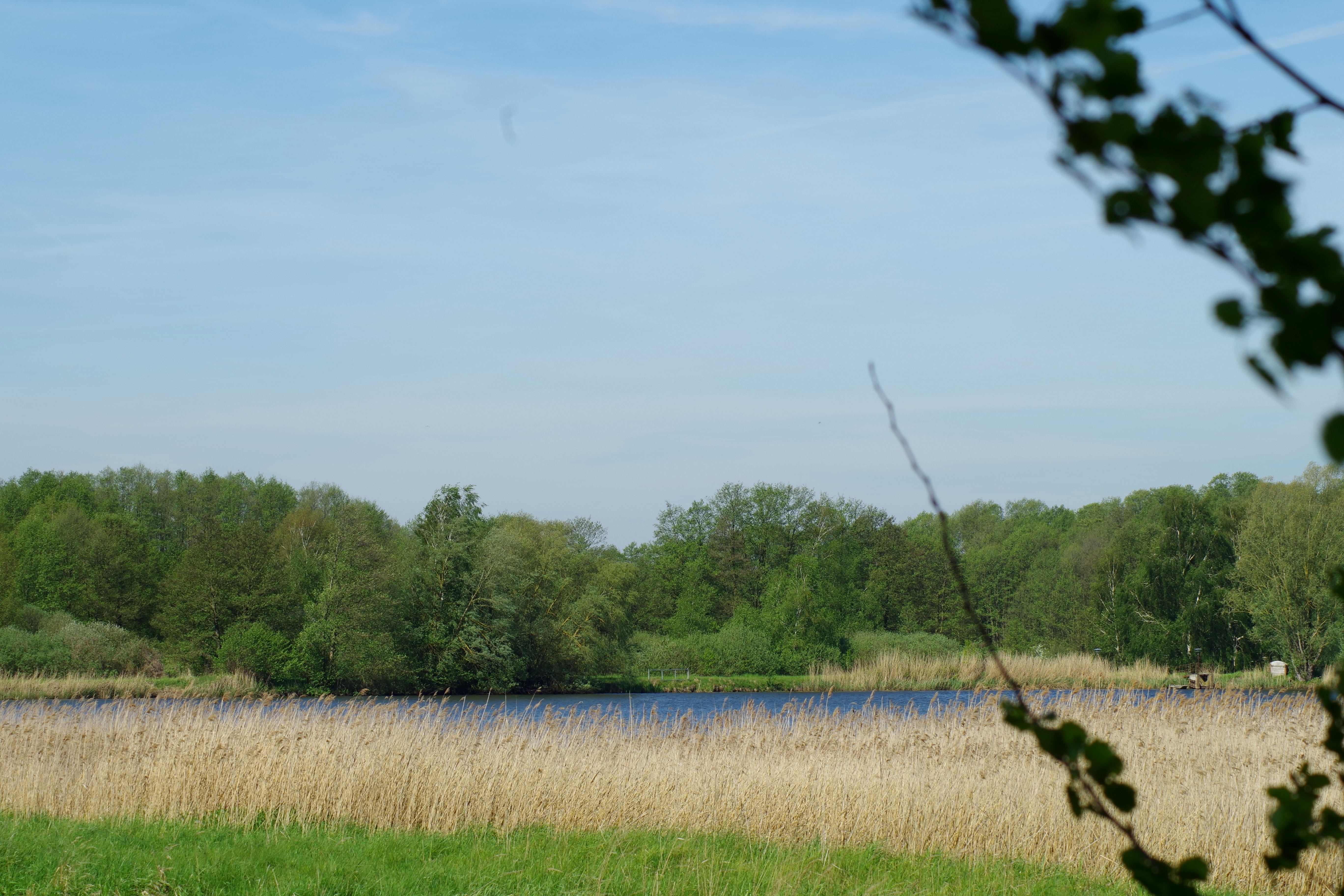 Nationalpark Müritz - An den Fischteichen bei Zartwitz